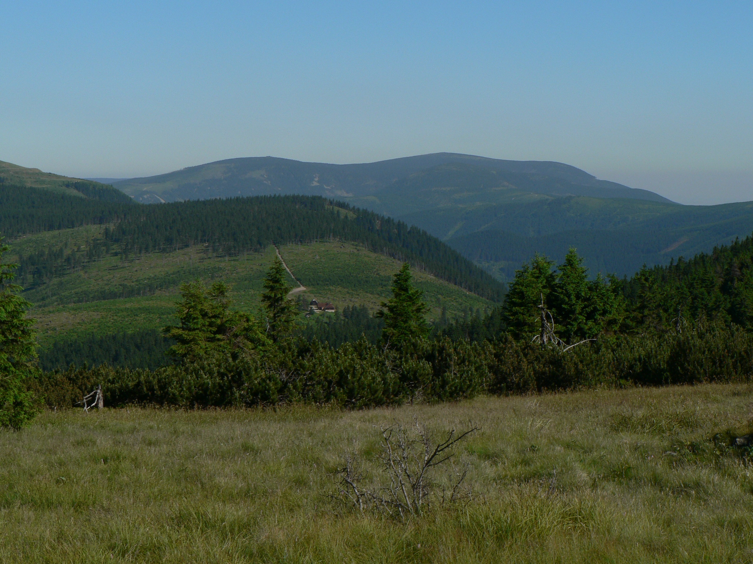 Pohled z hlavního hřebene na Velkou Jezernou, v pozadí Keprnická hornatina (vlevo Vozka, vpravo Keprník). V sedle před Velkou Jezernou je Františkova myslivna.